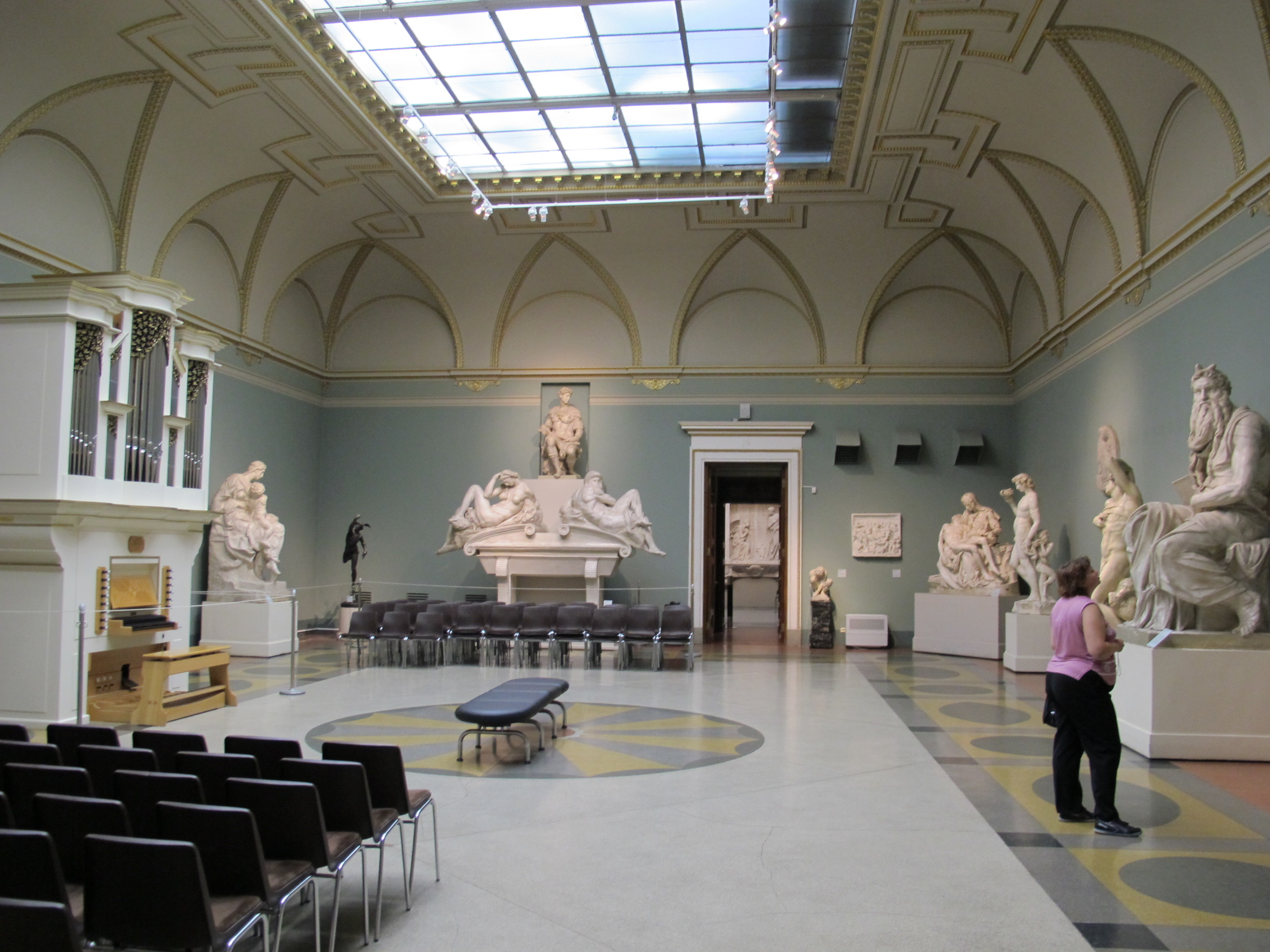 Museo pushkin, calchi, sala di michelangelo